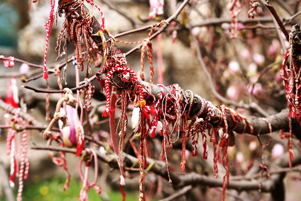 Magnolia full of tied Martenitsa, in Veliko Tarnovo (Велико Търново)